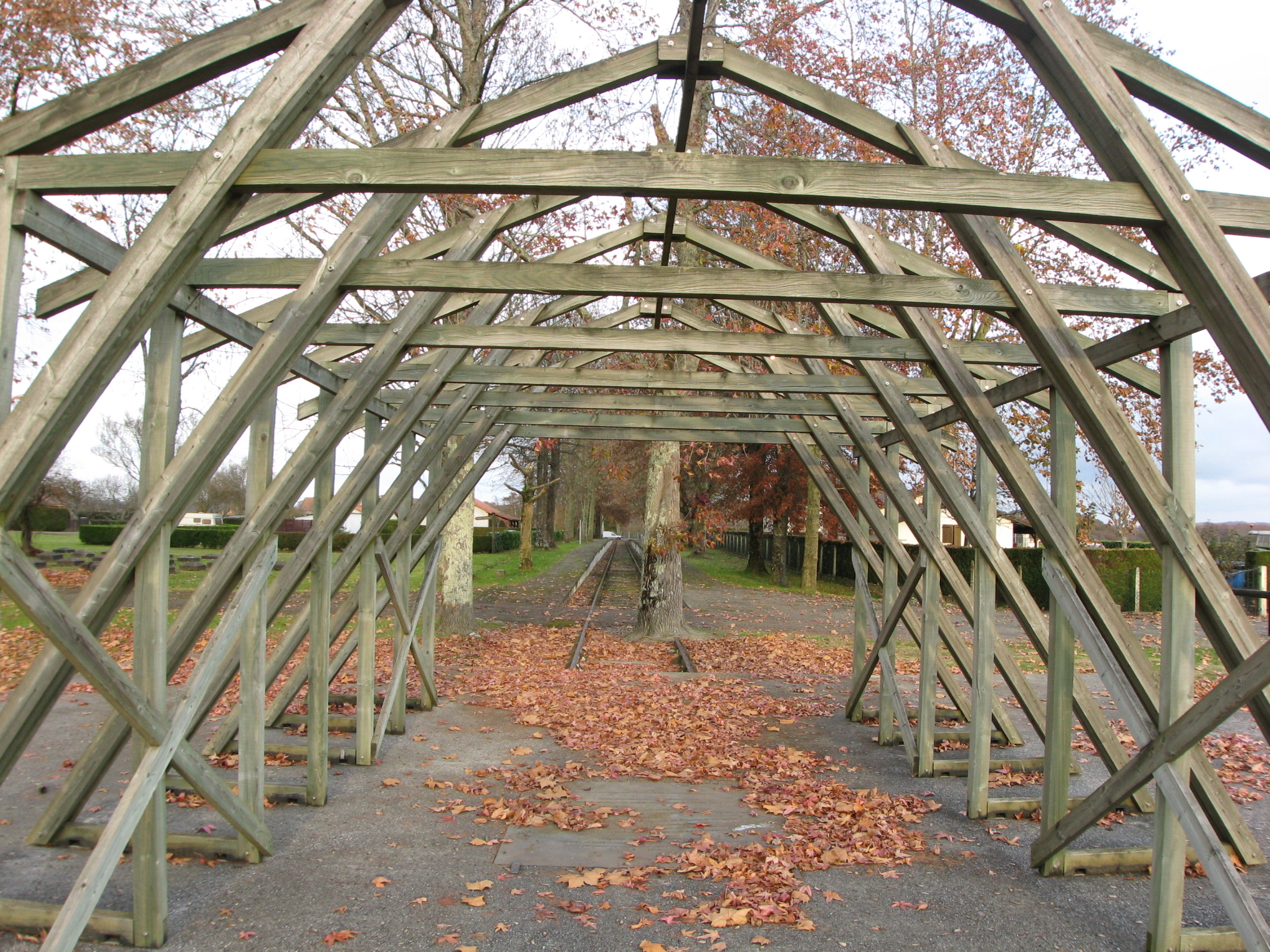 Barraquement reconstitué au camp de Gurs (Pyrénées-Atlantiques) (Pyrénées).